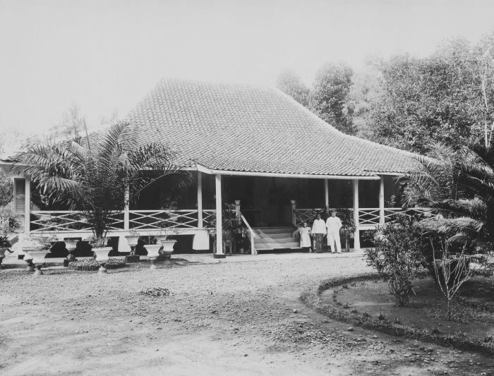 foto. De chef van de werkplaats van een onderneming met familie voor zijn woning in Soebang